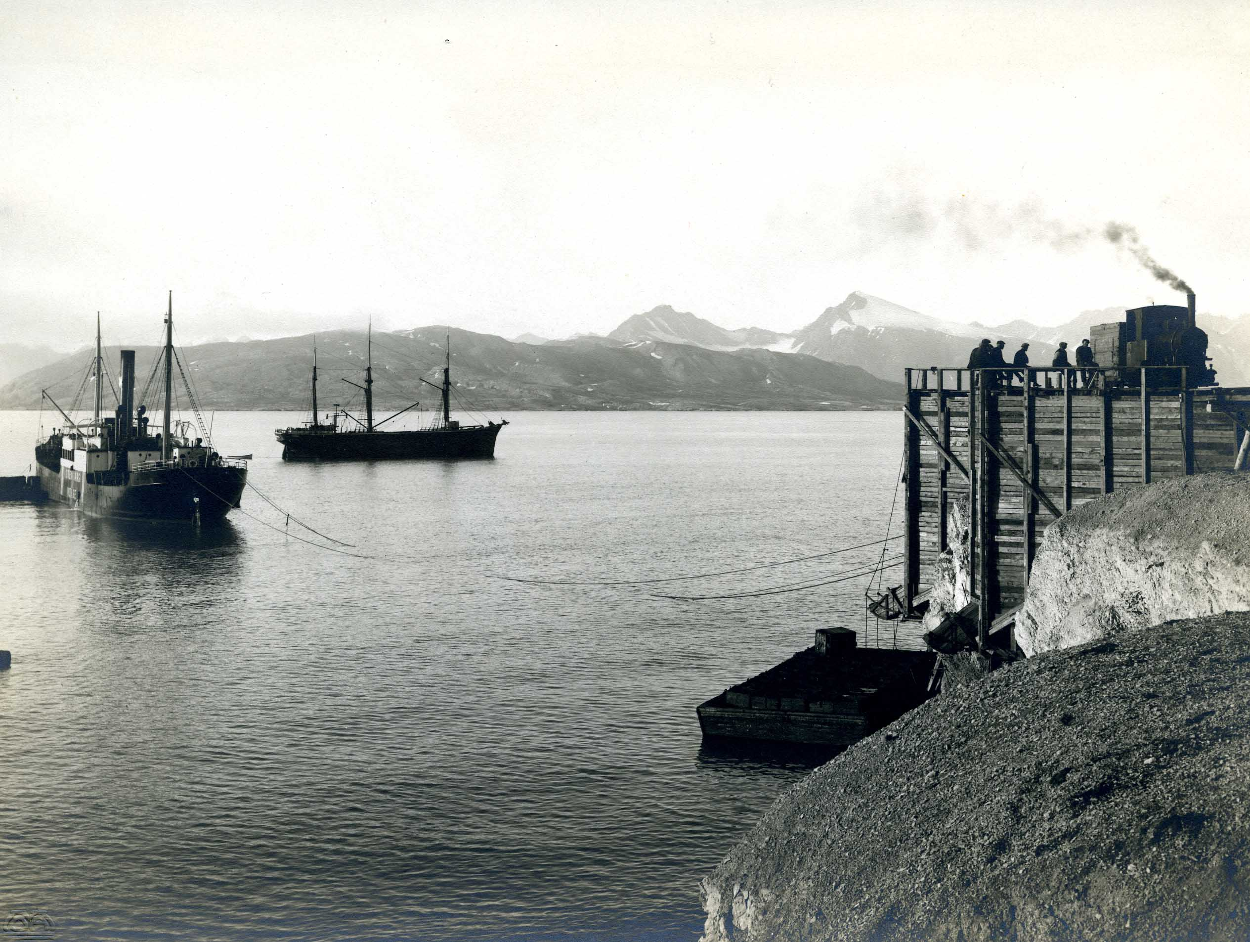 Siloen og en pram med kasser. En 2000 tonns båt under lasting. Arkivref.: PA-1632D1_2_13 Foto: Sigvald Moa